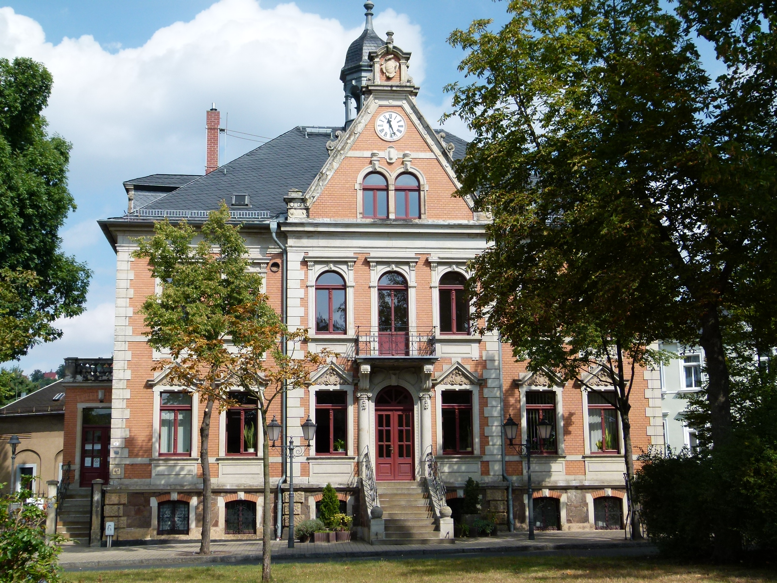 Denkmalgeschütztes Rathaus, Rosa-Luxemburg-Platz 1, Radebeul, Sachsen